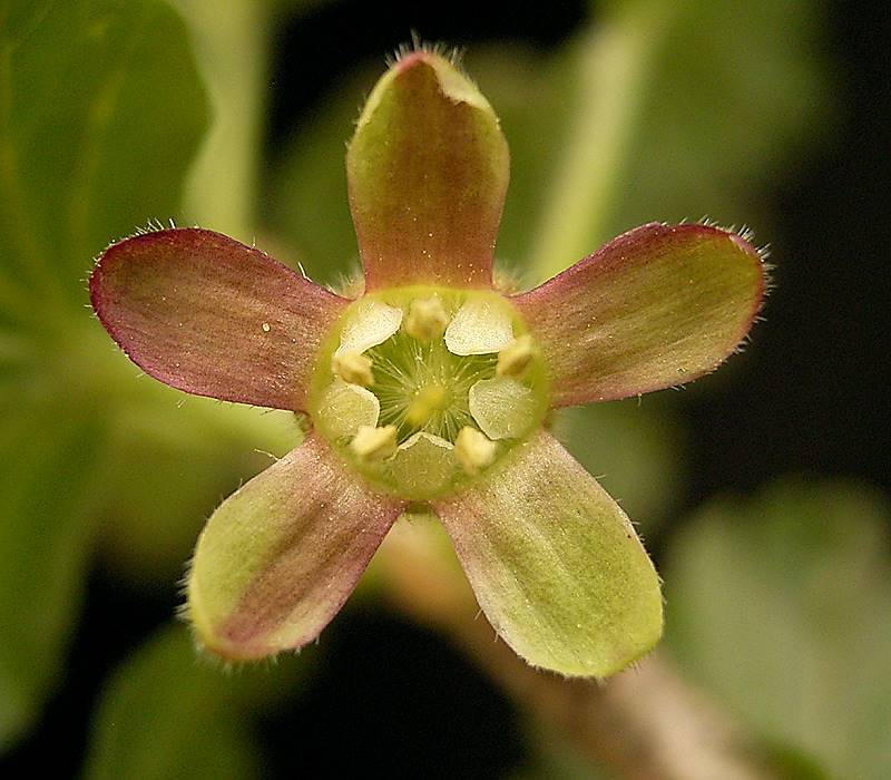 Ribes uva-crispa